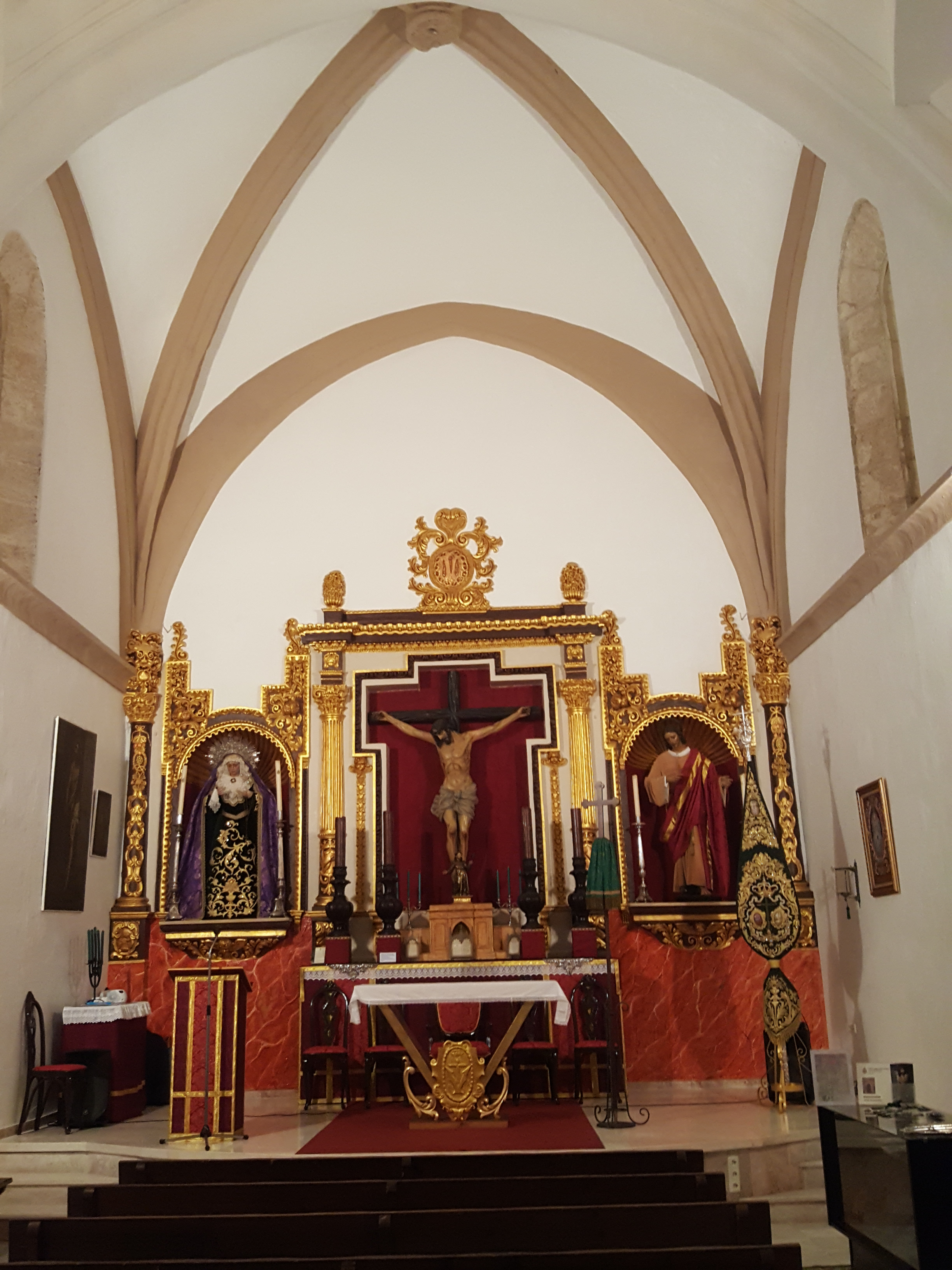 Capilla del Hospital del Corpus Christie. Capilla con su altar. Moguer (España)